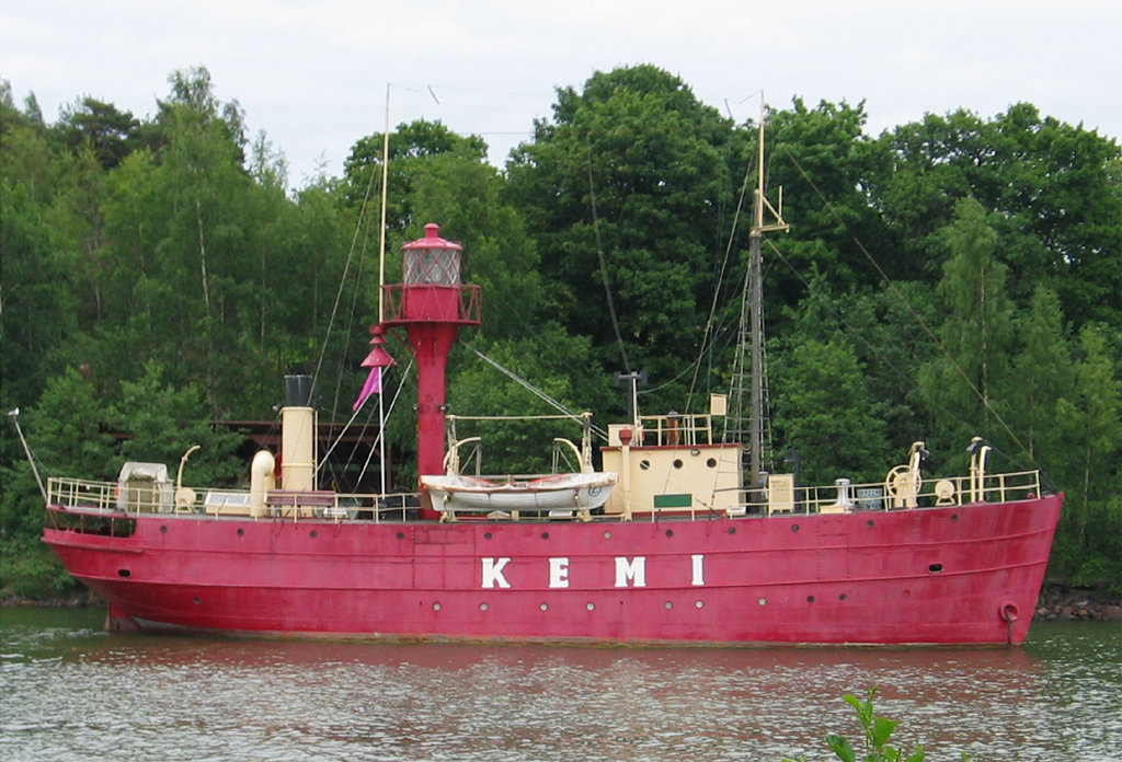 Lightvessel Kemi (ex. Äransgrund, Relandsgrund, Rauma)